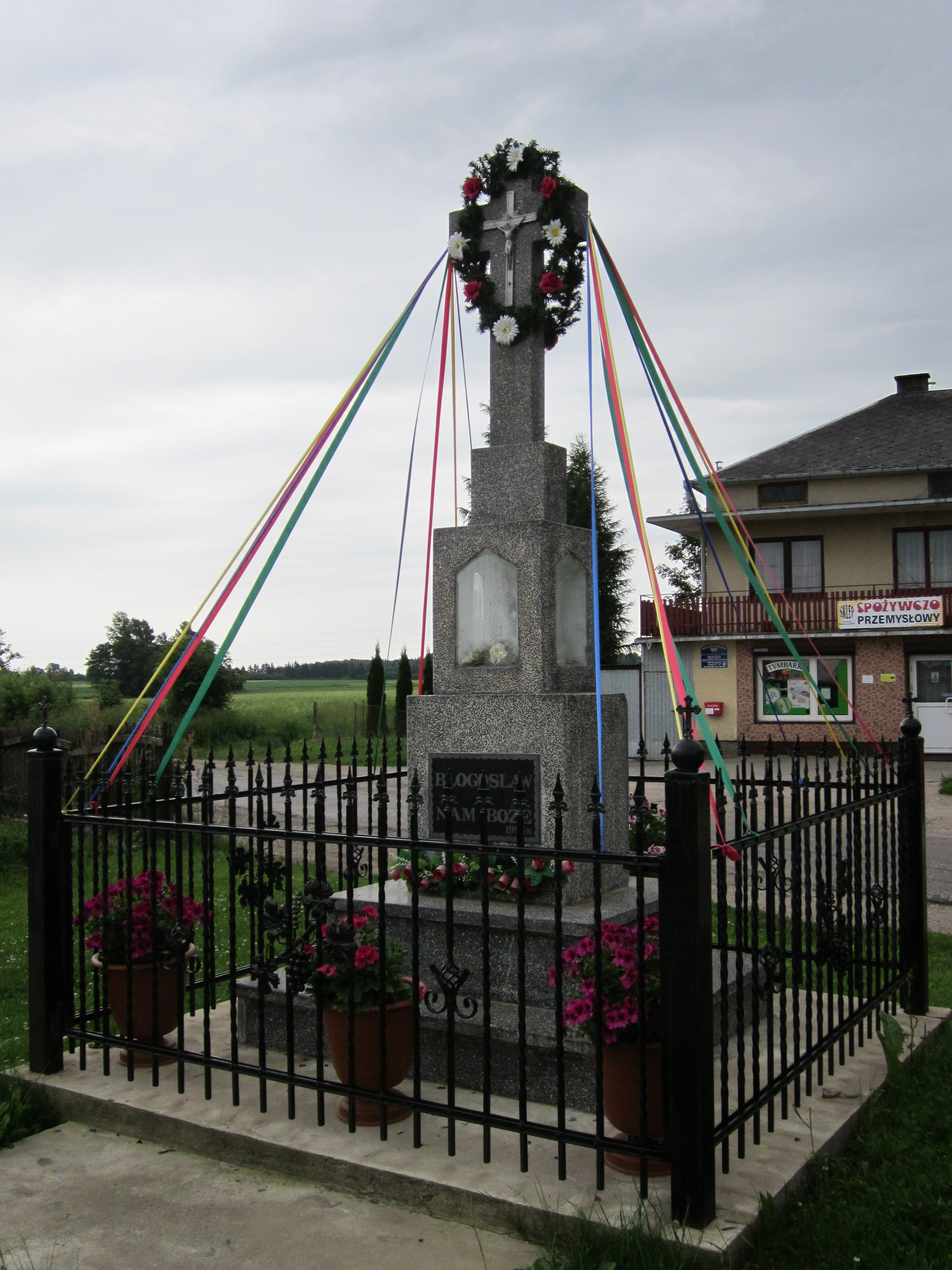 W kapliczce znajduje się figurka Matki Boskiej Niepokalanej.